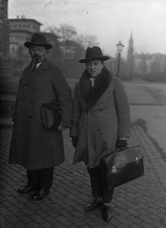 Leipzig. Der Prozess gegen die Tscheka vor dem Reichsgericht in Leipzig. Den Angeklagten ist zur Last gelegt, dass sie General v. Seeckt, Herrn v. Borsig und Hugo Stinnes aus dem Leben schaffen wollten. Die beiden Hauptverteidiger der Angeklagten der Tscheka links Rechtsanwalt Dr. Rosenthal [sic], rechts Dr. Löwenfeld [sic], welcher auch heftige Angriffe gegen den Vorsitzenden des Staatsgerichtshofes erhob.